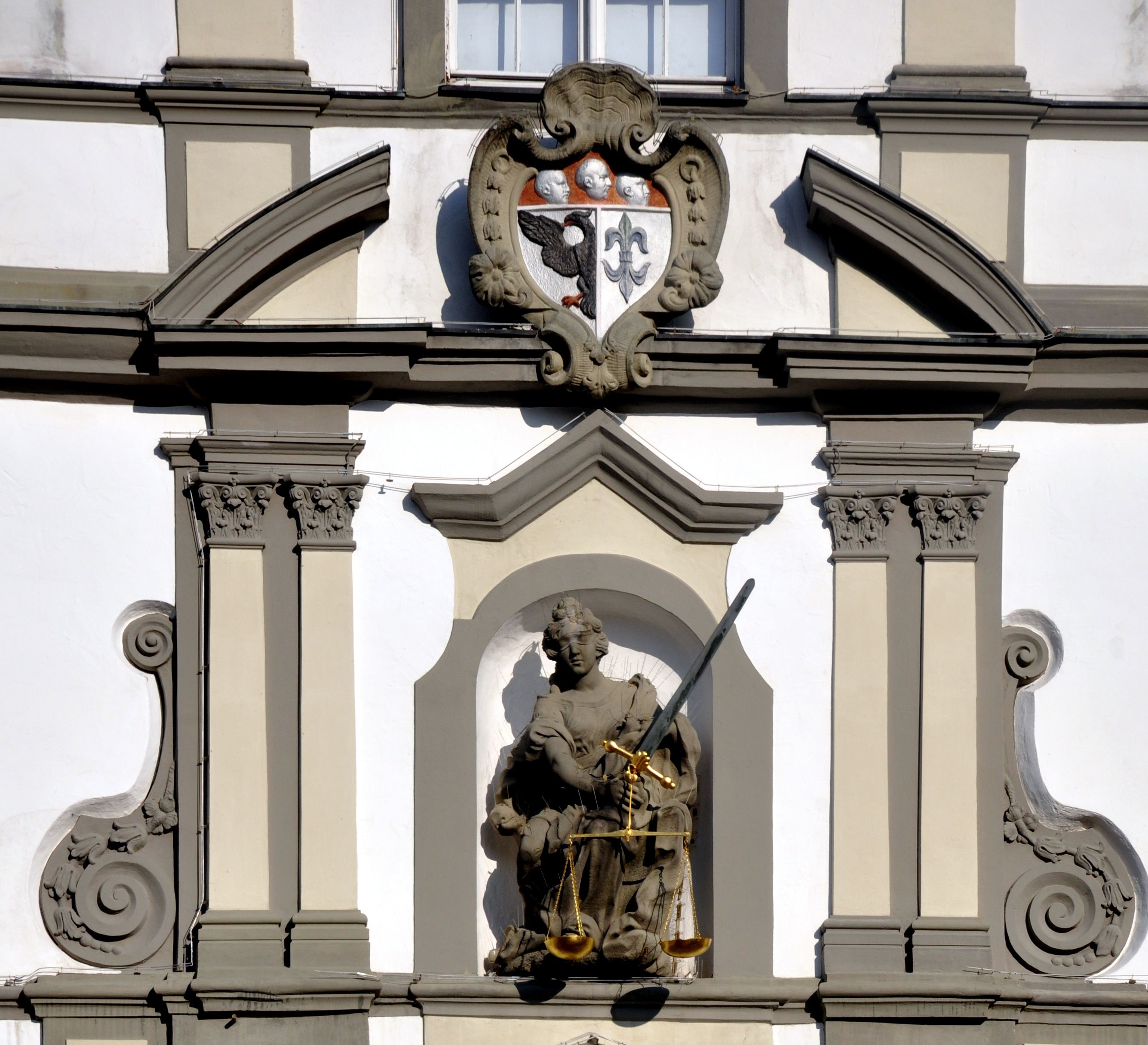 Wangen im Allgäu, Rathaus (Fassade zum Marktplatz), Fassadenschmuck: Justitita und Stadtwappen, von Franz Anton Kuen, 1719